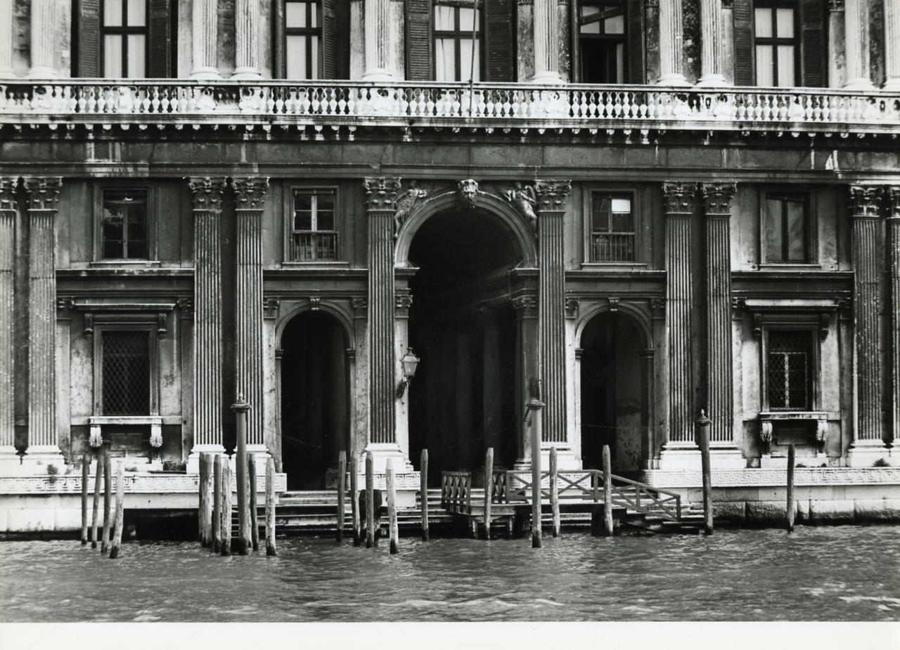 Servizio fotografico : Venezia, 1977 / Paolo Monti. - Stampe: 6 : Positivo b/n, gelatina bromuro d'argento/ carta, 24x30. - ((Al verso delle stampe manoscritti i numeri dei negativi corrispondenti (formato 35 mm) con indicazione del fotogramma: 2914/14, 2914/16, 2914/24, 2914/2[tagliato], 2914/32, 2914/37; iscrizioni didascaliche manoscritte a matita; timbro a inchiostro con copyright (Corso Sempione - Milano). - Sul coperchio della scatola iscrizione didascalica manoscritta a pennarello nero: "Venezia gotica". - Occasione: Documentazione per la pubblicazione: Olivato Loredana, Puppi Lionello, "Mauro Codussi", Milano, Electa, 1977. - di Olivato Loredana, Puppi Lionello: Mauro Codussi, Milano, Electa (1977). - Fonte: Fattura di Paolo Monti: IV. Commesse/ Fattura n. 05/ Fotografie per volume architetto veneziano Codussi - Prof. Puppi (1977/03/31), presso Archivio Paolo Monti. - Fonte: Quaderno di Paolo Monti: Leica 1501-3000 Controllo numerazione (1950-1978), presso Archivio Paolo Monti. - Fonte: Monografia